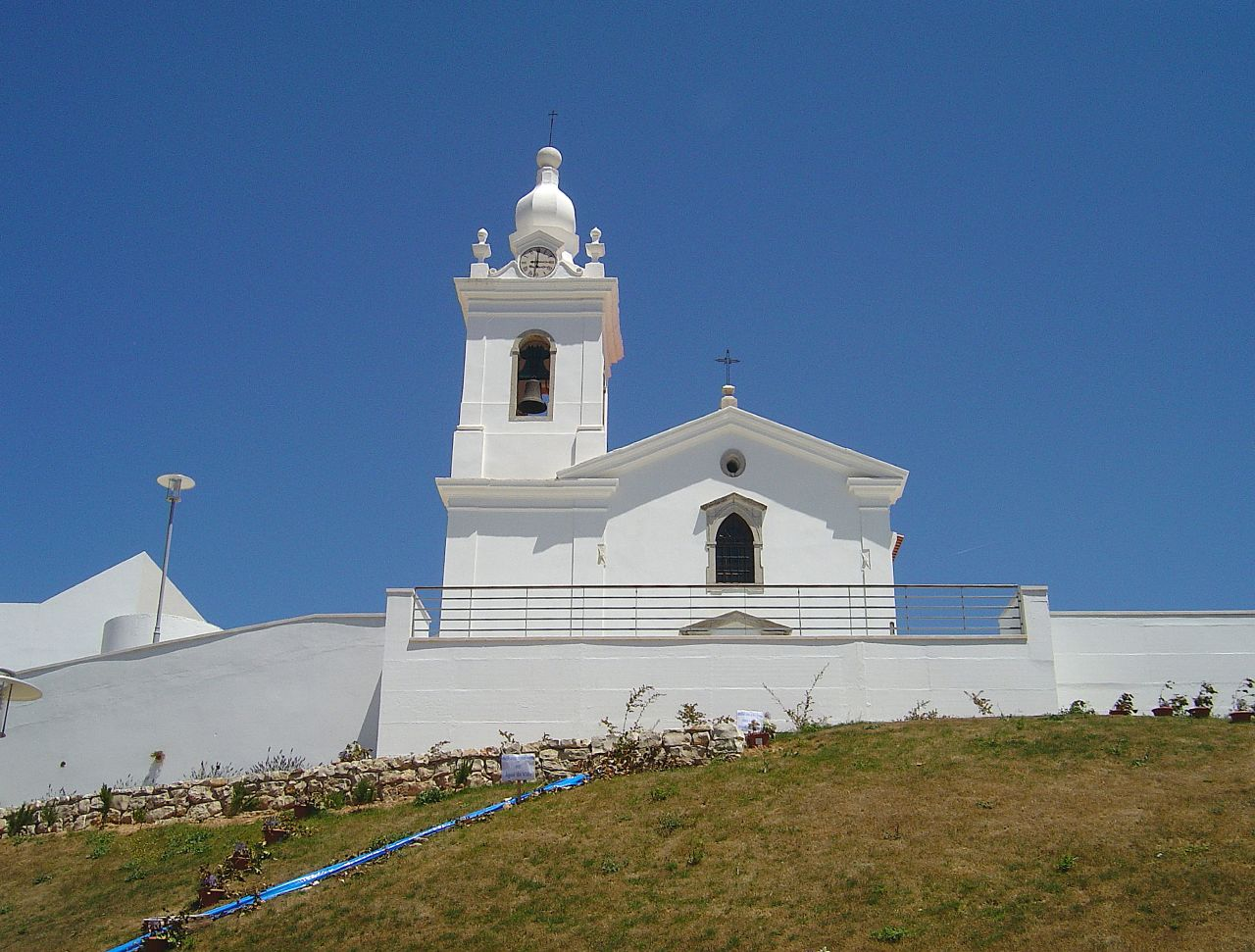 Cadaval